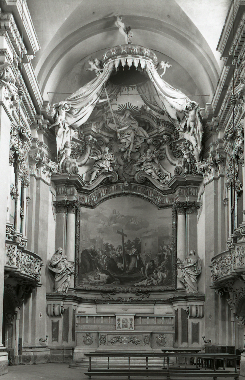 Servizio fotografico : Modena, Chiesa di San Carlo (interno), 1972 / Paolo Monti. - Strisce: 4, Fotogrammi complessivi: 21 : Negativo b/n, gelatina bromuro d'argento/ pellicola ; 35 mm. - ((Sul portanegativi: NIKMAT FP4 e iscrizione: "Modena - Chiesa dei Nobili -21". - Occasione: Documentazione sulla scultura barocca in Emilia per la pubblicazione: Riccomini Eugenio, "Ordine e vaghezza: scultura in Emilia nell'età barocca", Bologna, Zanichelli, 1972. Fotografie eseguite secondo le indicazioni del Professor Riccomini. - : Leica 1501-3000 Controllo numerazione (1950-1978), presso Archivio Paolo Monti. - Fonte: Agenda di Paolo Monti: Monti - Agenda 1972 (1972/01/22), presso Archivio Paolo Monti. - Fonte: Monografia di Riccomini, Eugenio: Ordine e vaghezza: scultura in Emilia nell'età barocca, Bologna, Zanichelli (1972). - Fonte: Fattura di Paolo Monti: IV. Commesse/ Fattura n. 16/ Scultura barocca in Emilia - Prof. Riccomini (1972/09/20), presso Archivio Paolo Monti. N. 378 fotografie in Bologna e varie città emiliane - formato stampa 24x30. N. 185 fotografie scelte per la pubblicazione. N. 193 fotografie alternative e varianti di quelle precedenti. - Fonte: Agenda di Paolo Monti